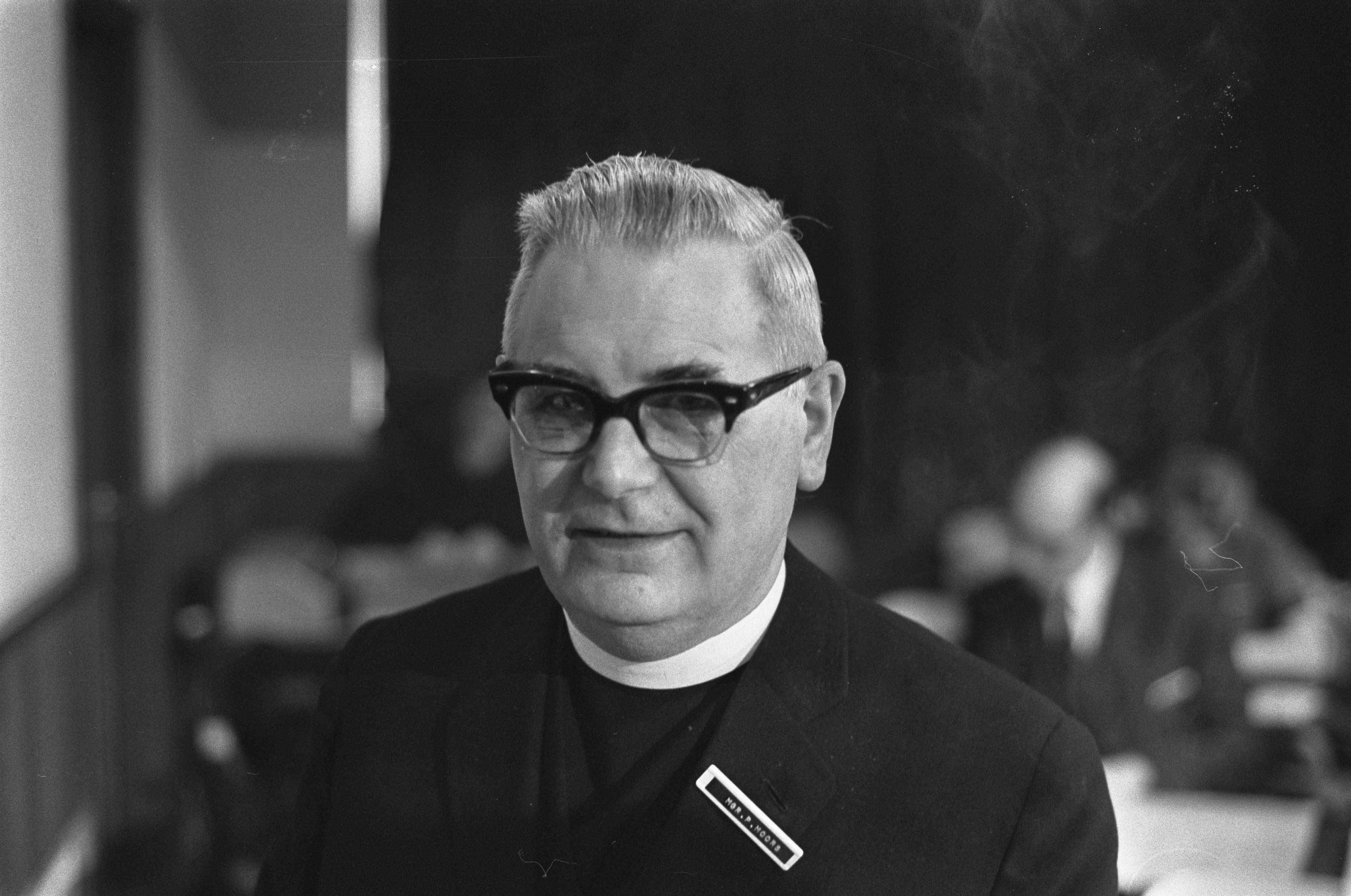 Collectie / Archief : Fotocollectie Anefo Reportage / Serie : [ onbekend ] Beschrijving : Pastoraal Concilie in Noordwijkerhout. Nummer 31 Mgr. P. J. A. Moors (bisschop), nummers 32.33 Mgr. H. Th. E. Beel (bisschop) Datum : 6 januari 1970 Locatie : Noordwijkerhout, Zuid-Holland Trefwoorden : CONCILIE Persoonsnaam : Mgr. H. Th. E. Beel, Mgr. P. J. A. Moors Fotograaf : Evers, Joost / Anefo Auteursrechthebbende : Nationaal Archief Materiaalsoort : Negatief (zwart/wit) Nummer archiefinventaris : bekijk toegang 2.24.01.05 Bestanddeelnummer : 923-1301